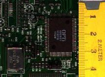 Ausschnitt einer SMD-Platine, GFDL aufgenommen von Honina 14:02, 21. Jan 2004 (CET)".